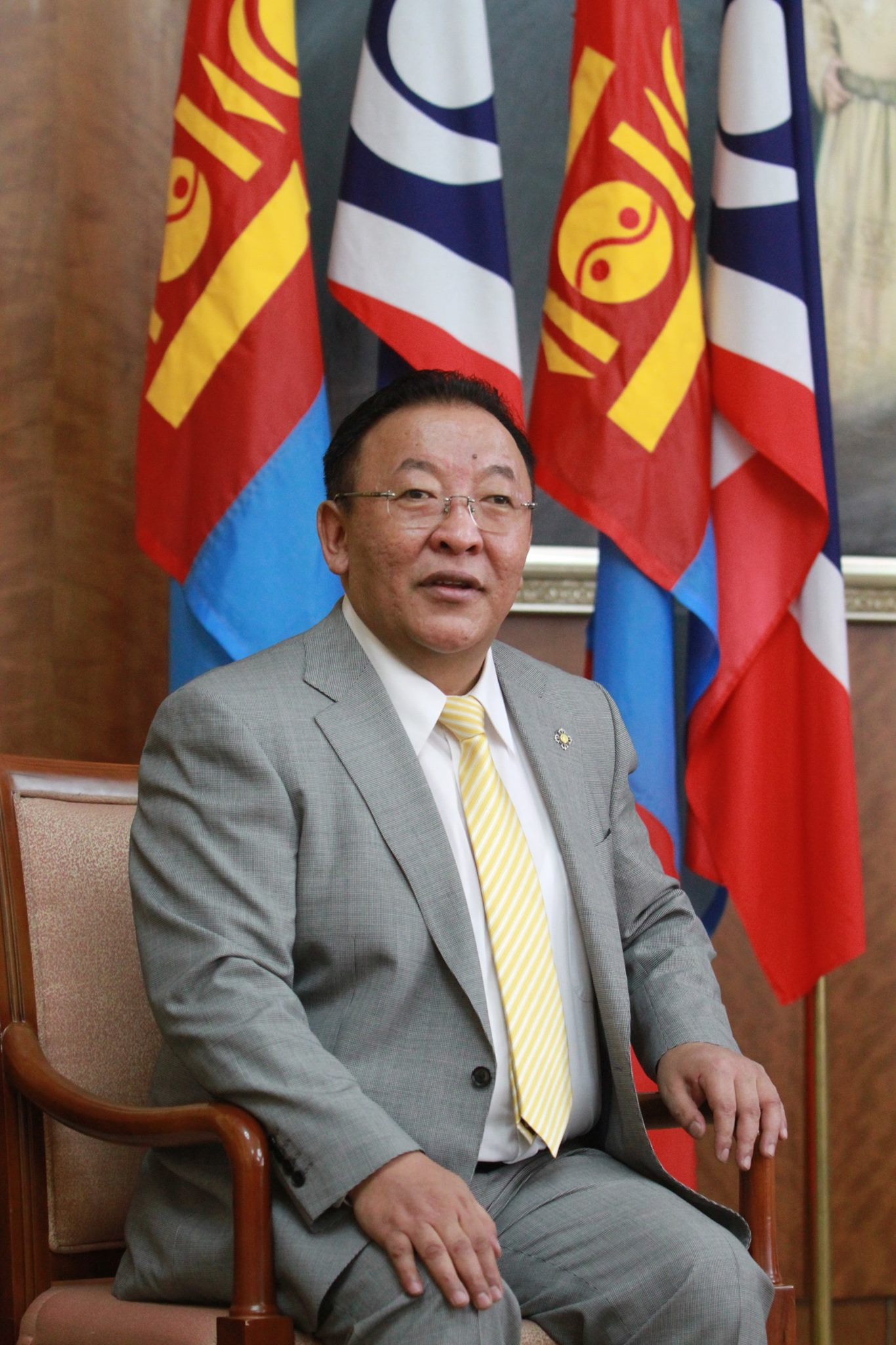 Монгол: Д.Ганхуяг2